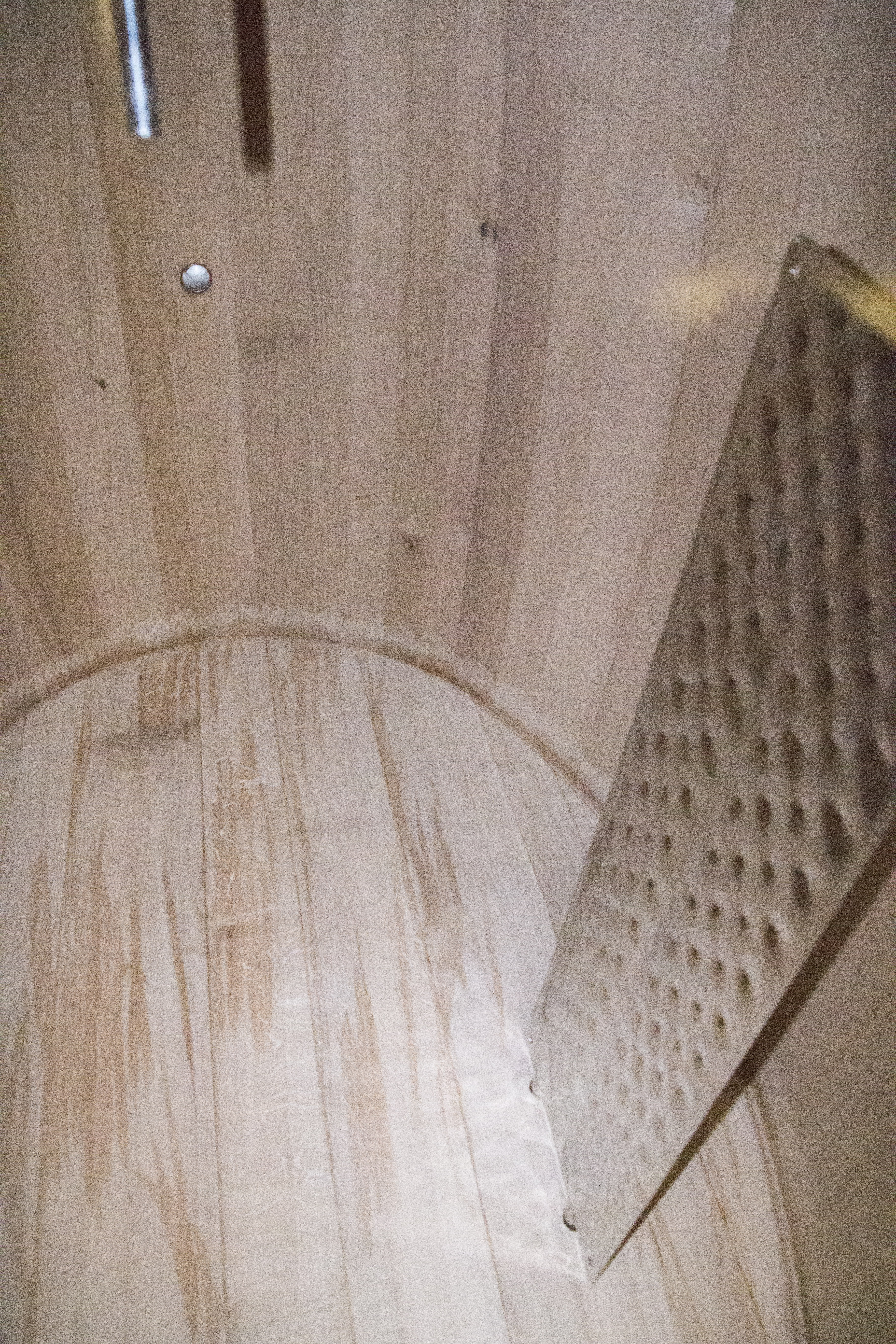 Intérieur d'un foudre et drapeau de refroidissement.